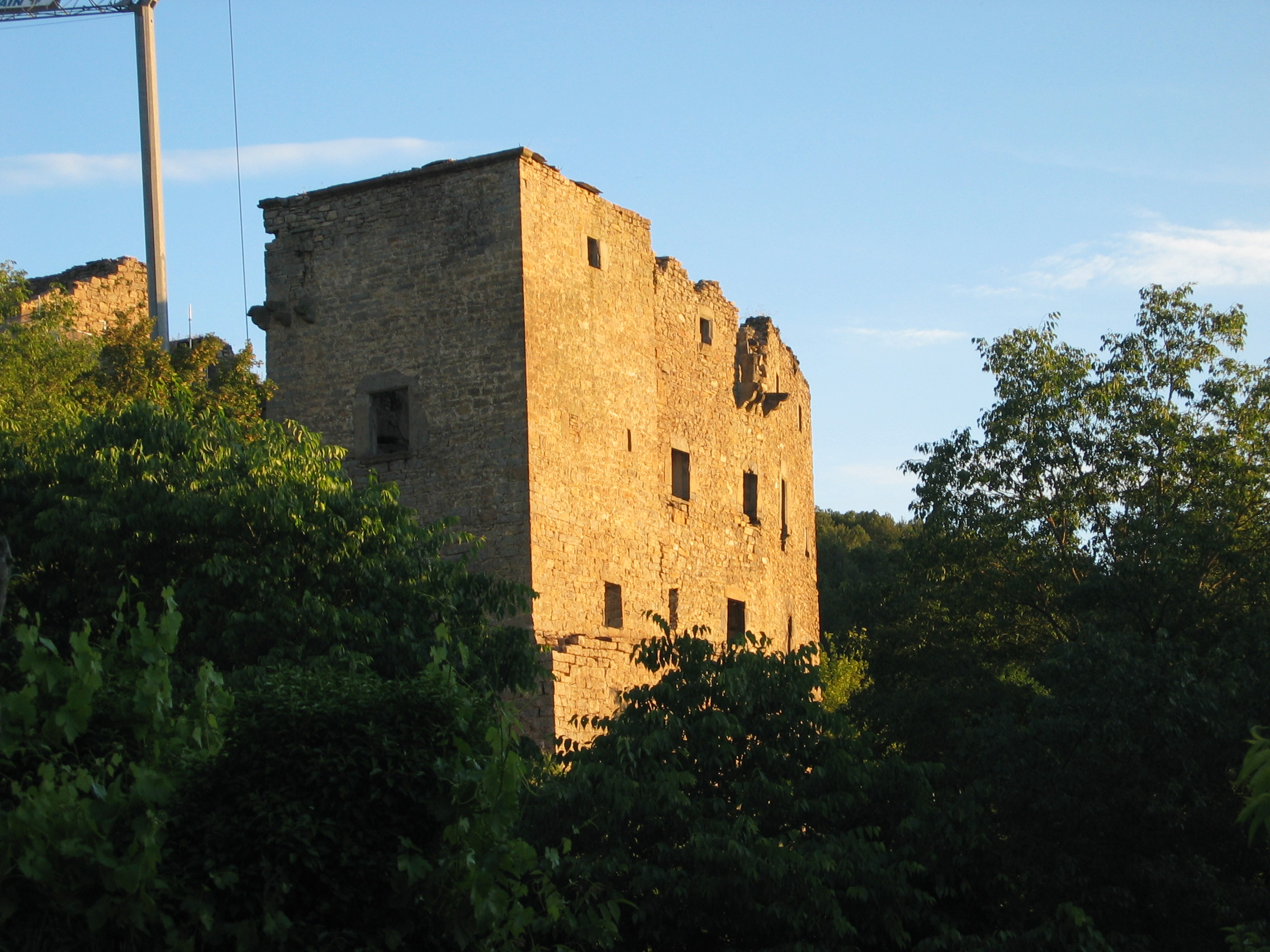 Fachada Noroeste de Palacio de Barón de Pallaruelo en La Fueva (Huesca)